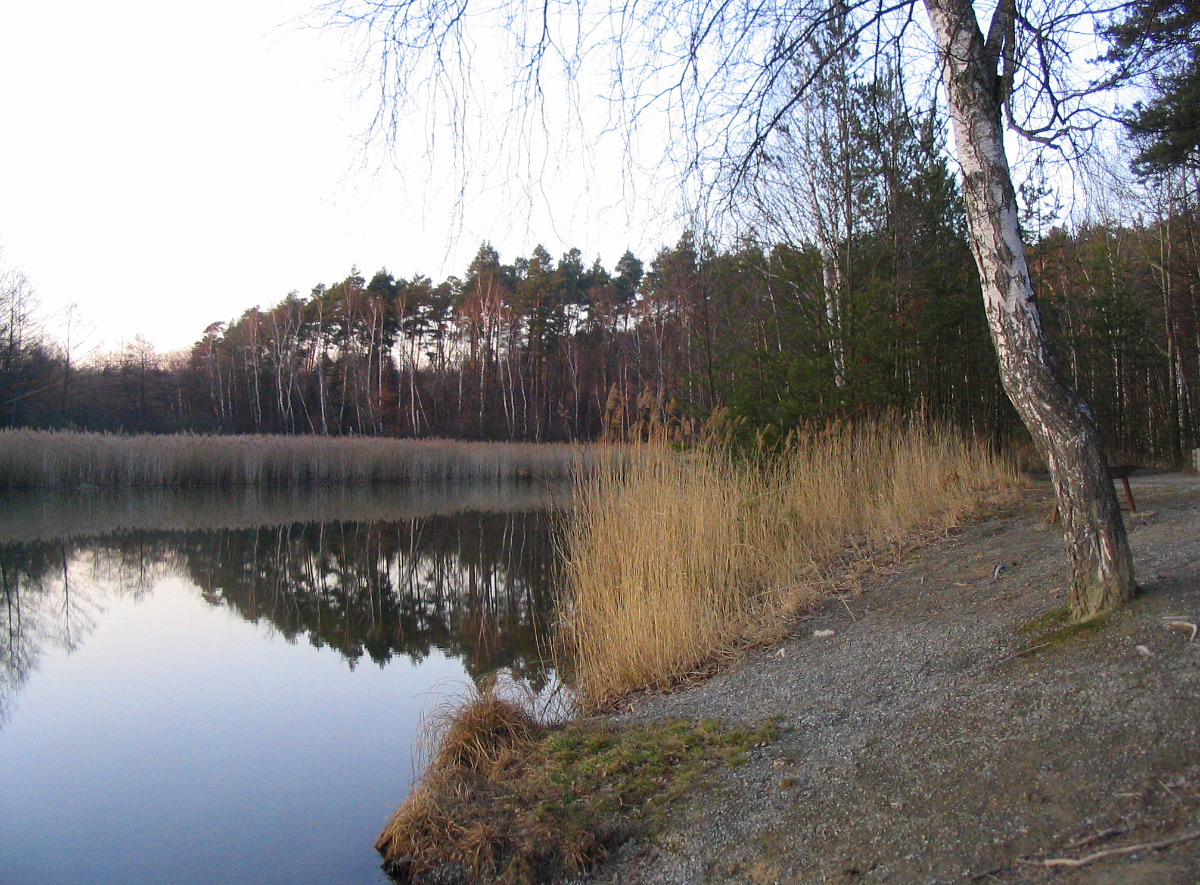 Společenství vysokých ostřic v severozápadním zálivu Senecký rybník